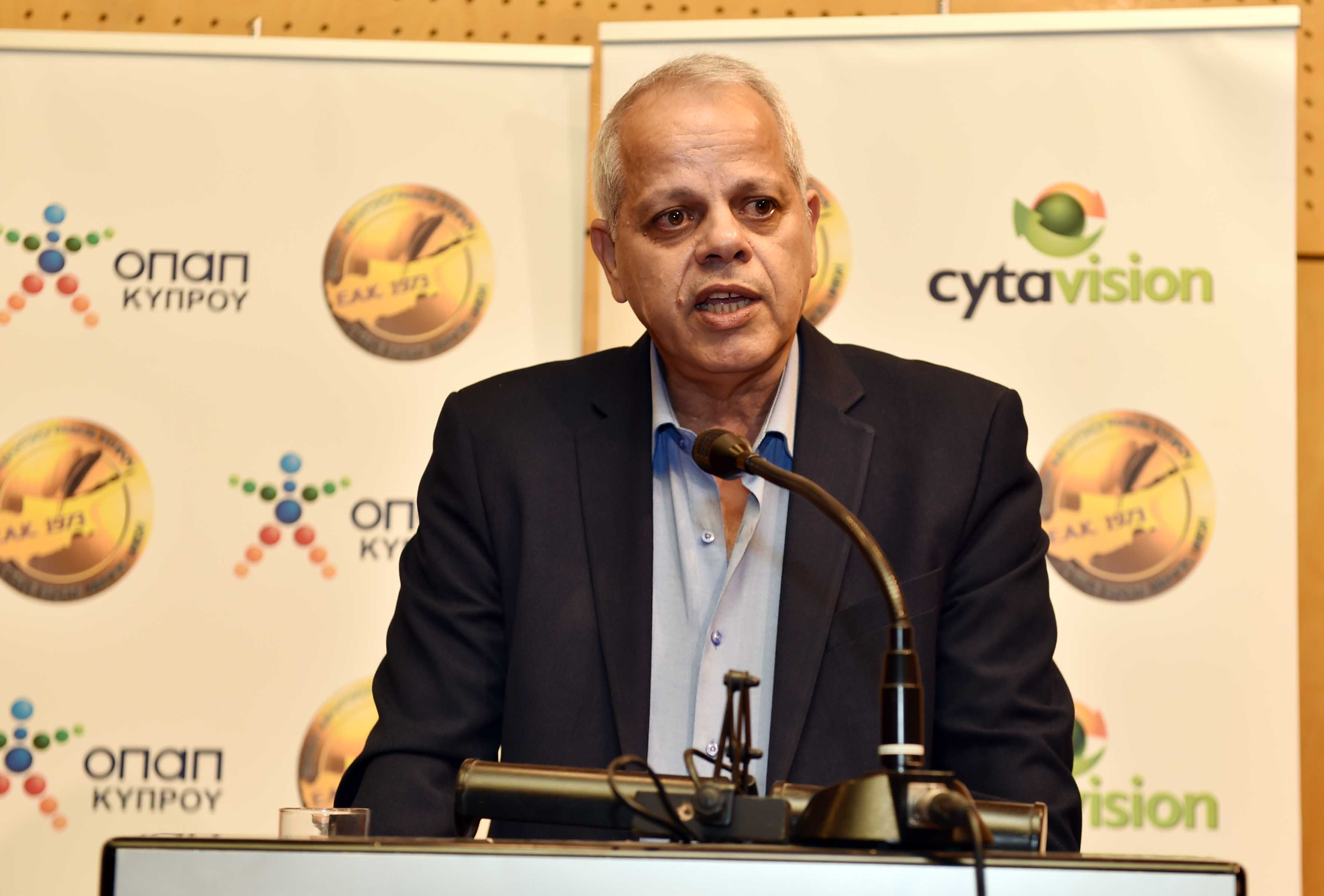 Ο Παναγιώτης Φελλούκας συγκινημένος κατά την ομιλία αποχώρησης του από την ΕΑΚ την 1η Ιουνίου 2018